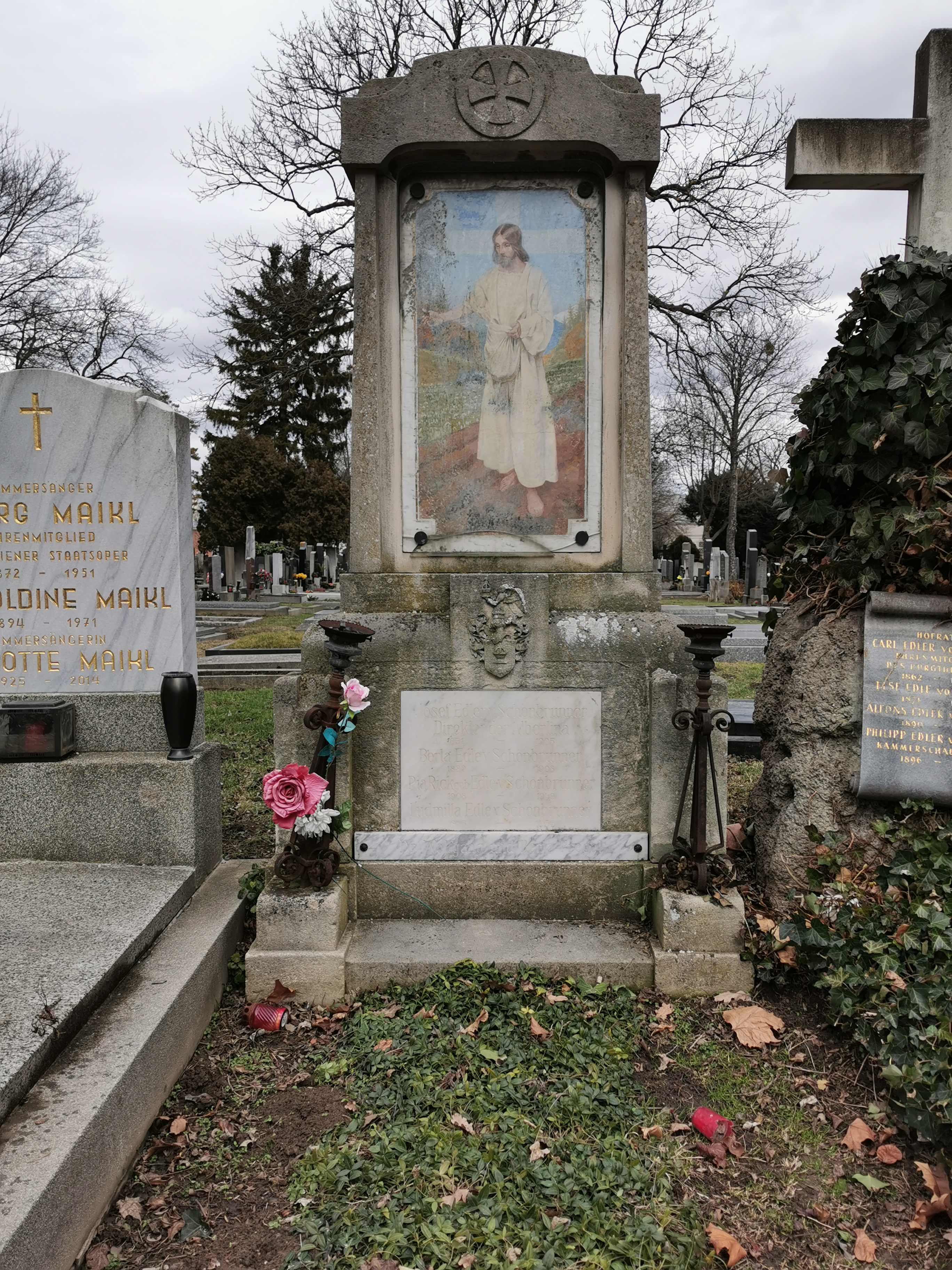 Grab von Josef Schönbrunner